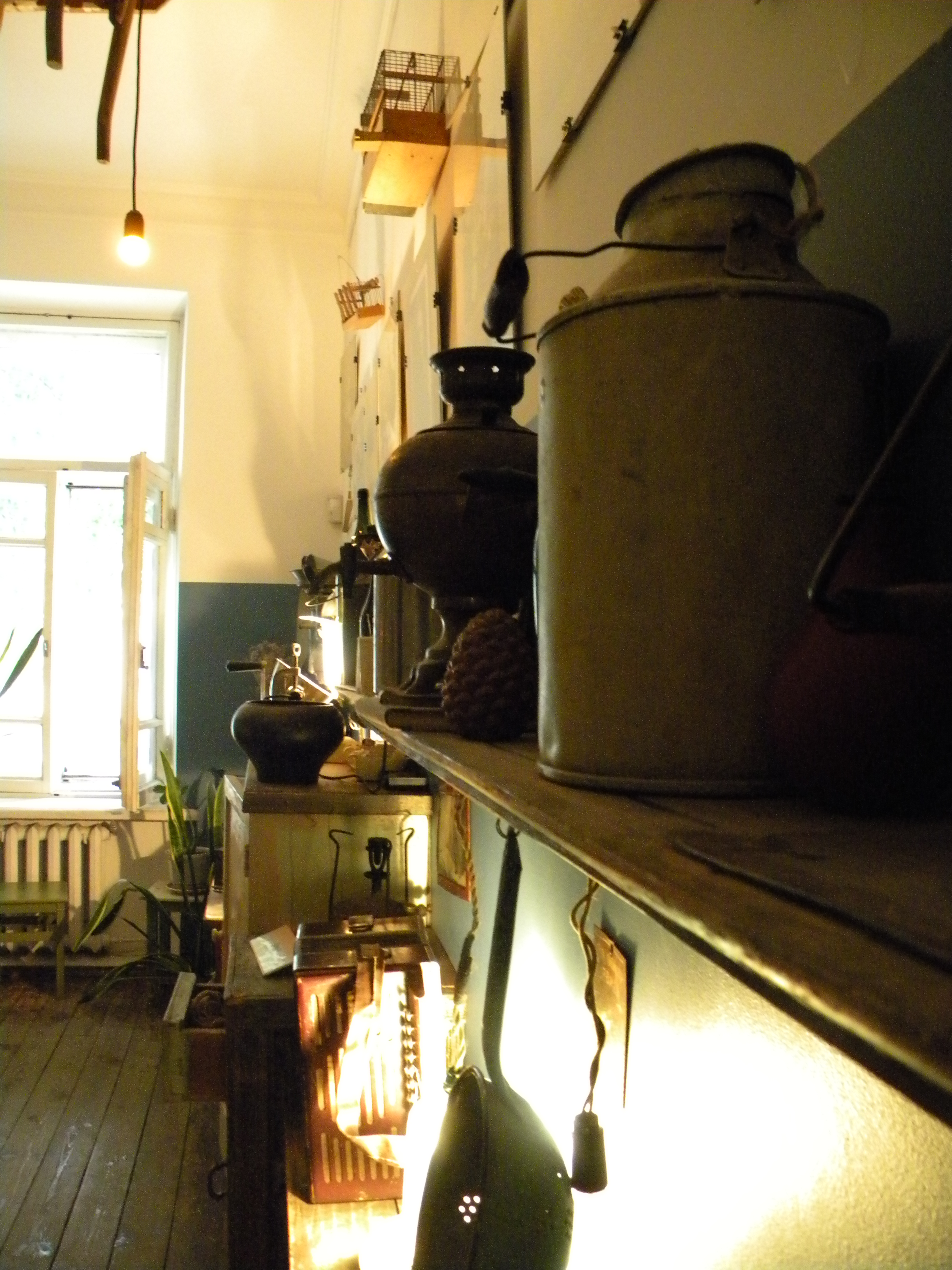 Bulgakov Museum